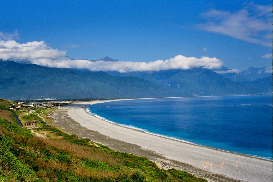 2004.02.01.七星潭